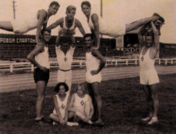 Участники Урало-Кузбасской спартакиады, прошедшей в 1932 году в Свердловске